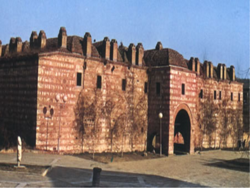 Turški zapor Kuršumli an v Skopju.